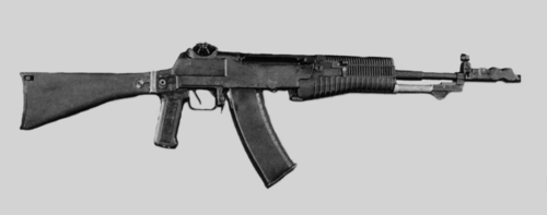 Rifle AN-94